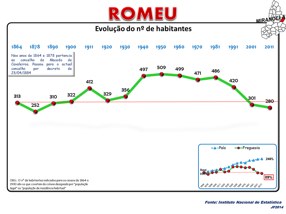 Evolução da População 1864 / 2011